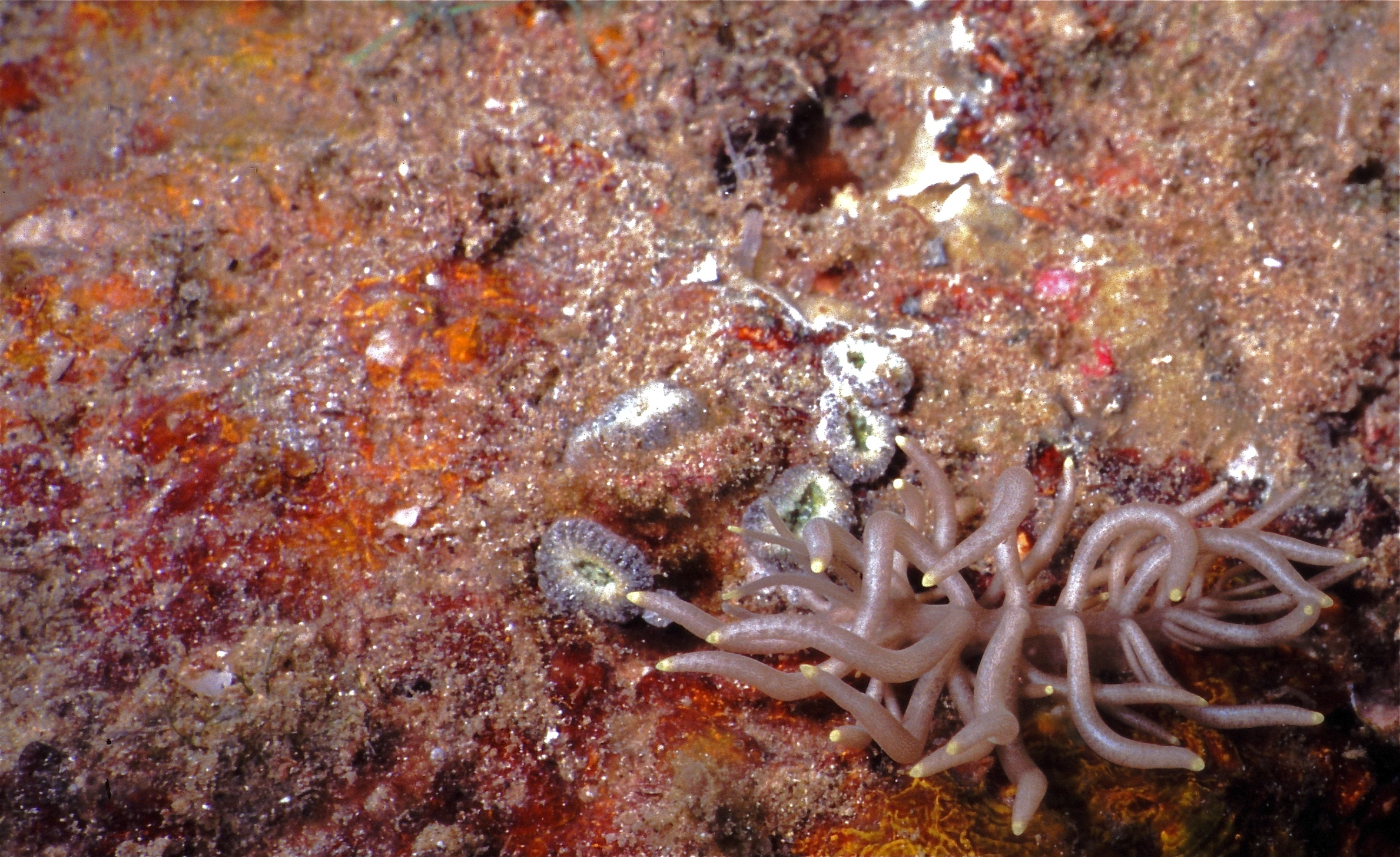 Bunaken, Sulawesi, INDONESIA